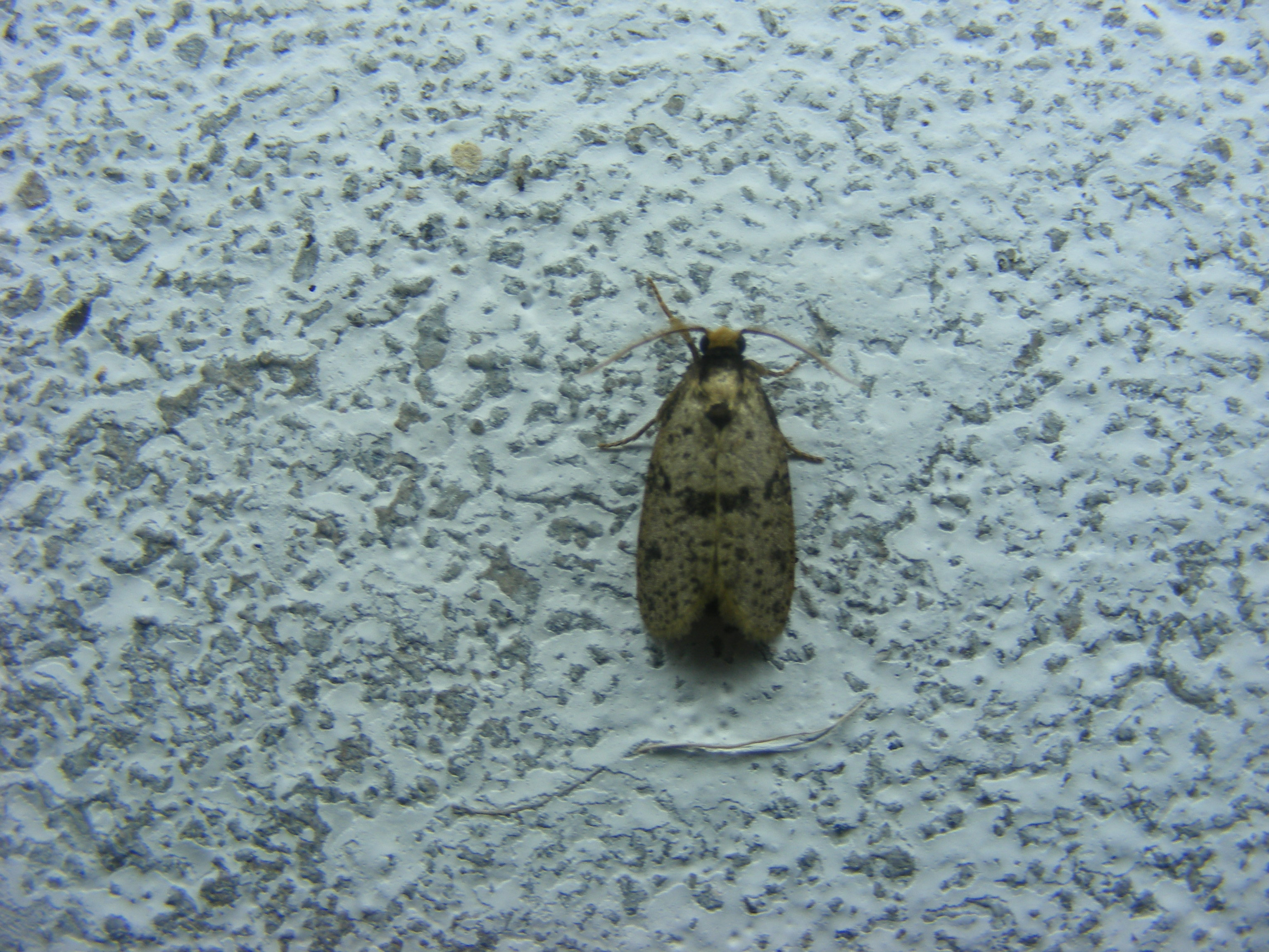 Thanks Roger for id